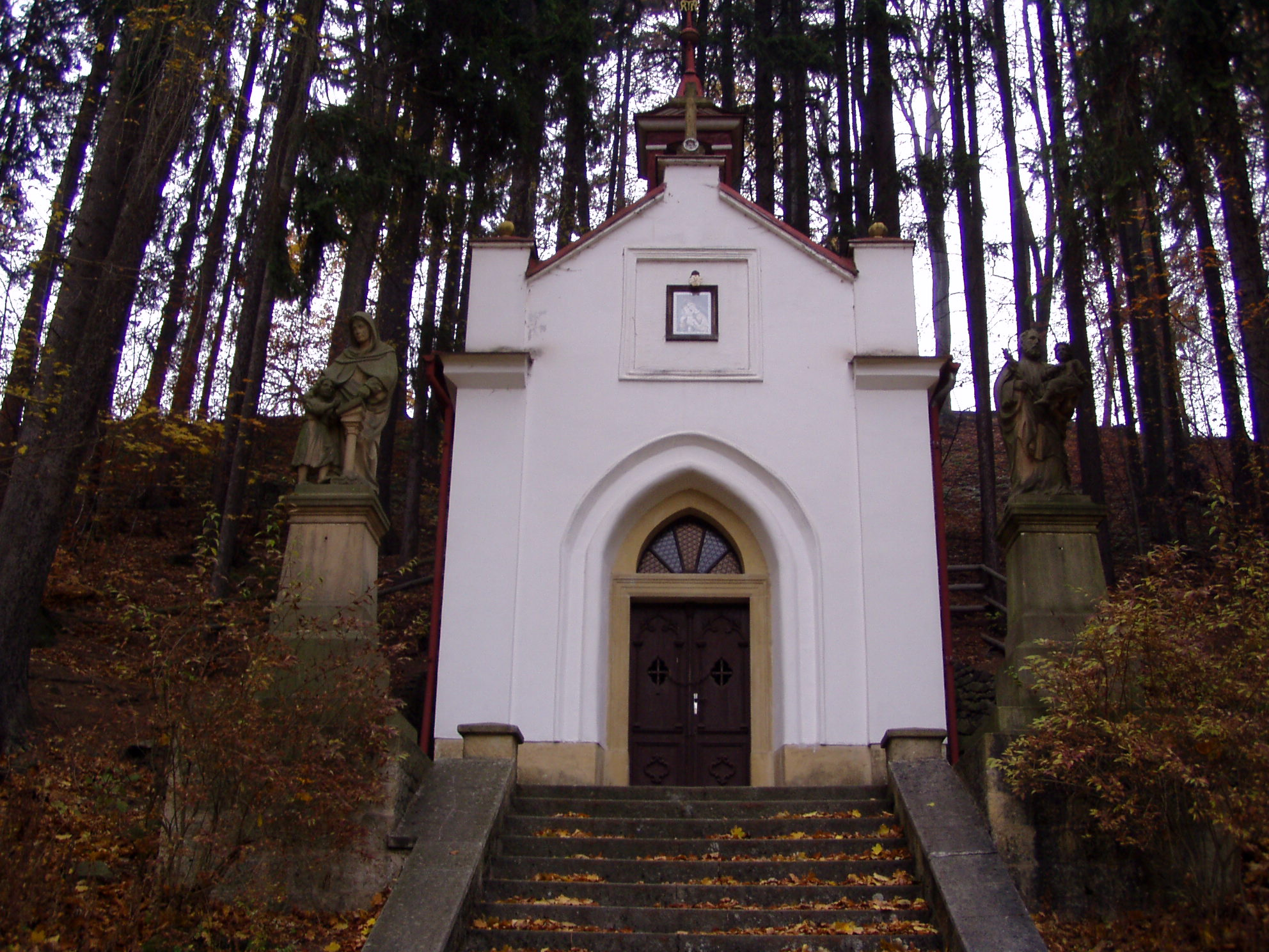 Kaple Panny Marie Lurdské (Suchý Důl)